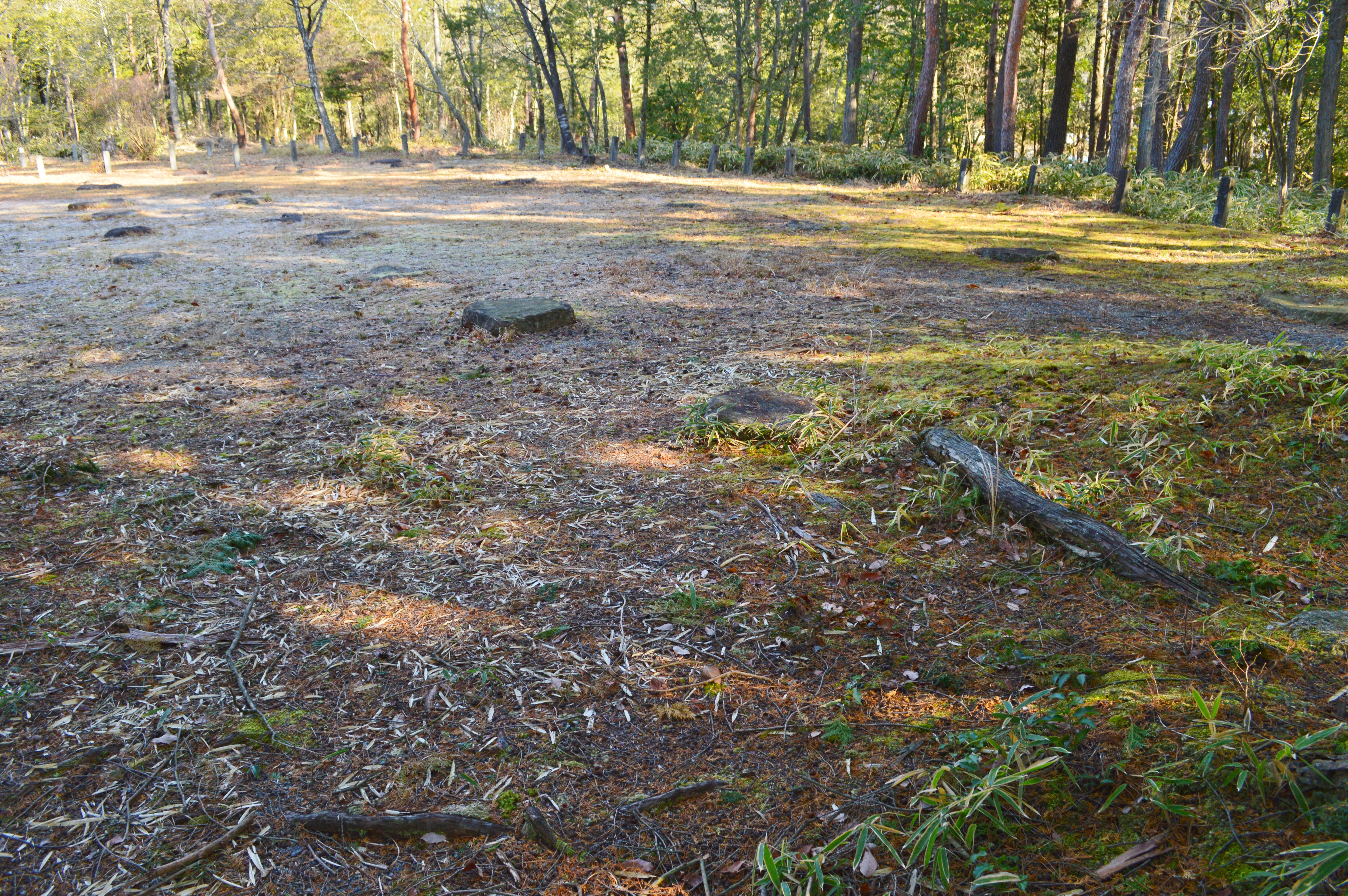 紫香楽宮跡内裏野地区 東面僧坊跡